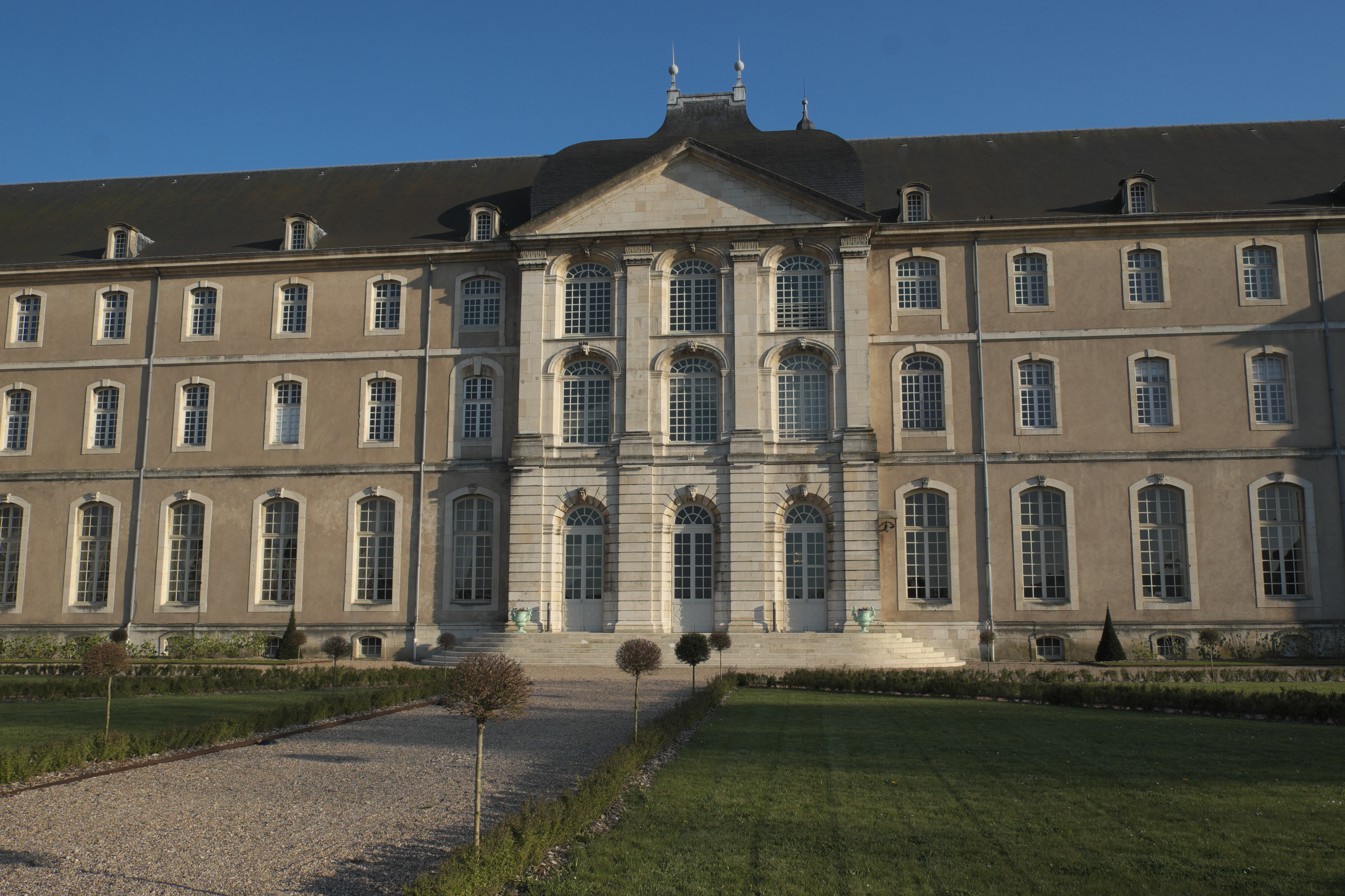 Ehemalige Prämonstratenserabtei in Pont-à-Mousson im Département Meurthe-et-Moselle (Region Grand Est/Frankreich)